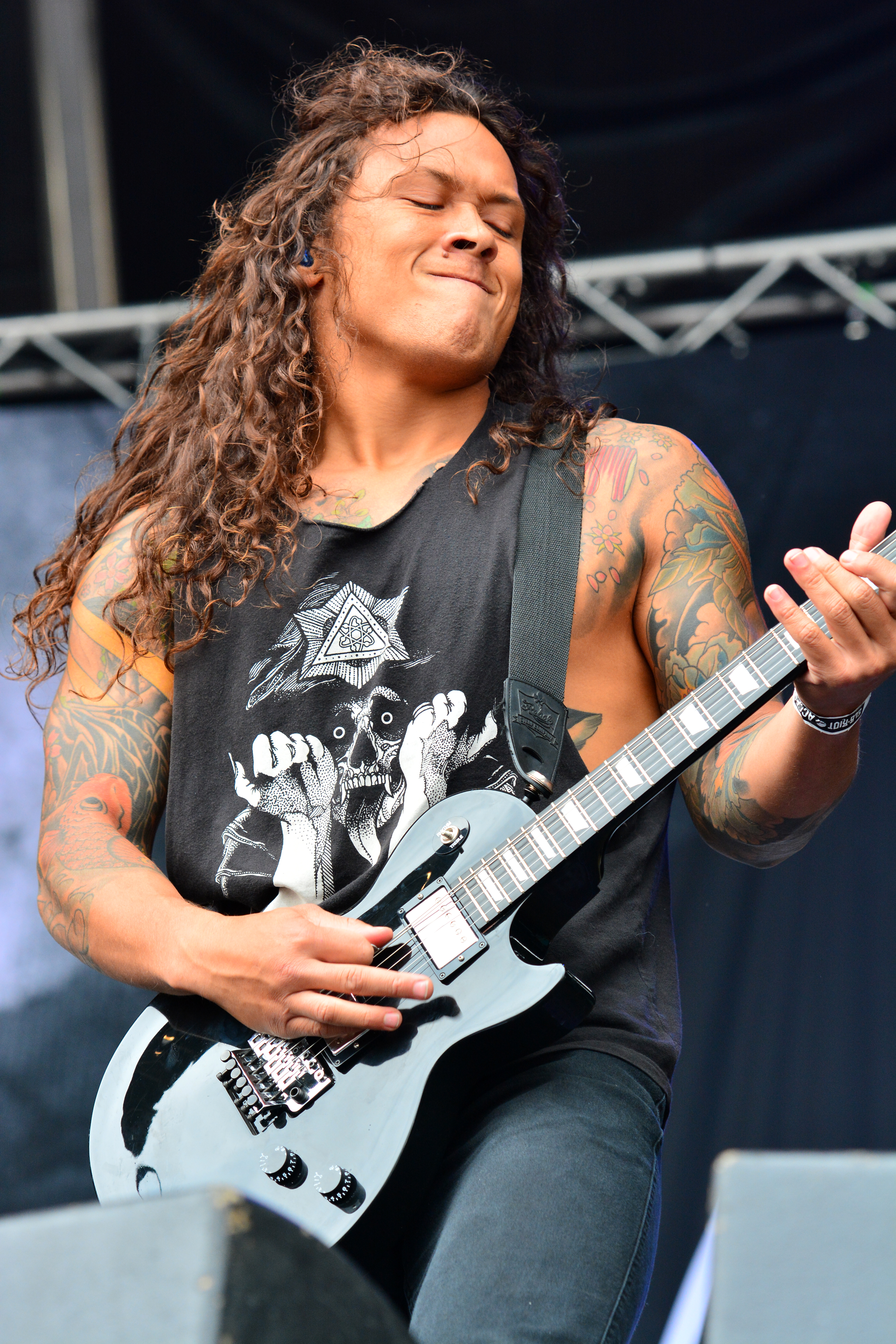 Gitarrist Nick Hipa von Wovenwar beim Elbriot 2014